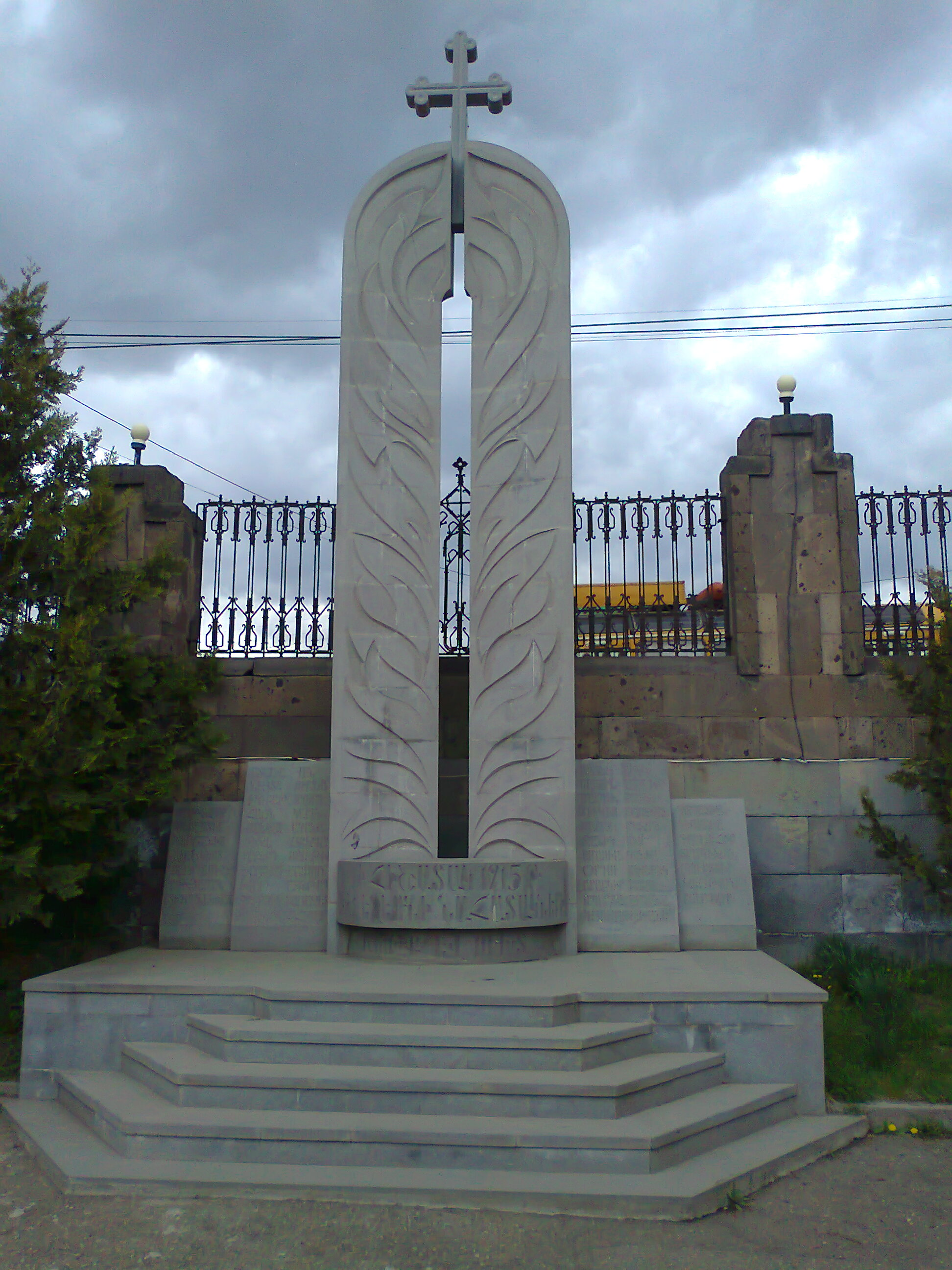 Եղեռնի զոհերի հուշակոթող Վանաձորում